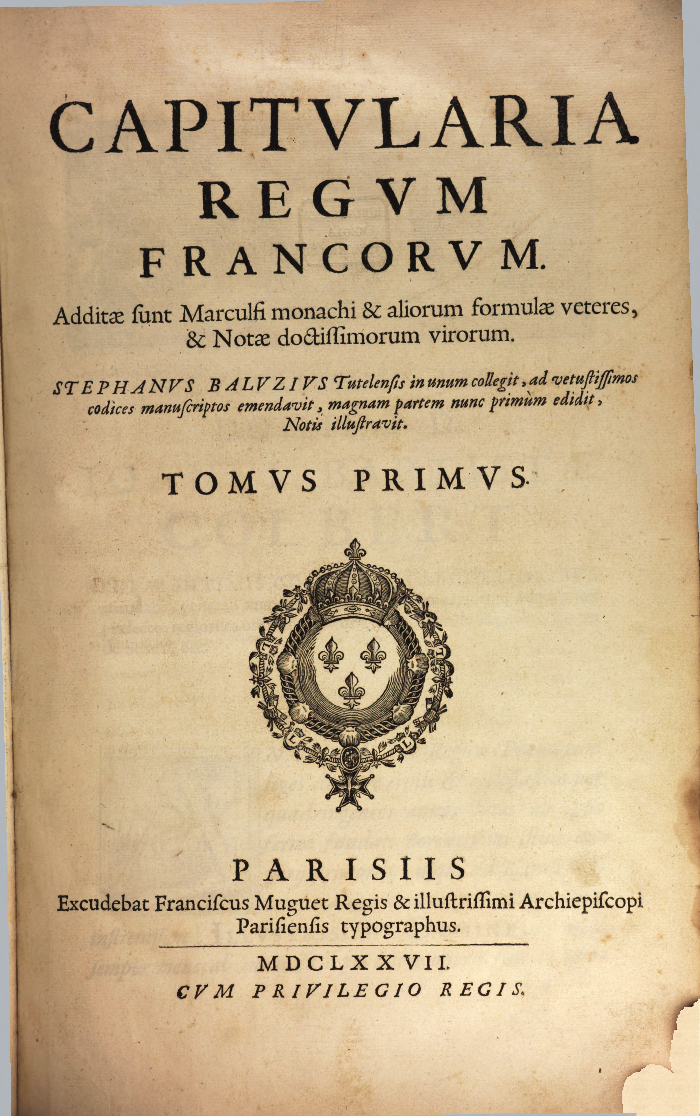 Capitularia Regum Francorum